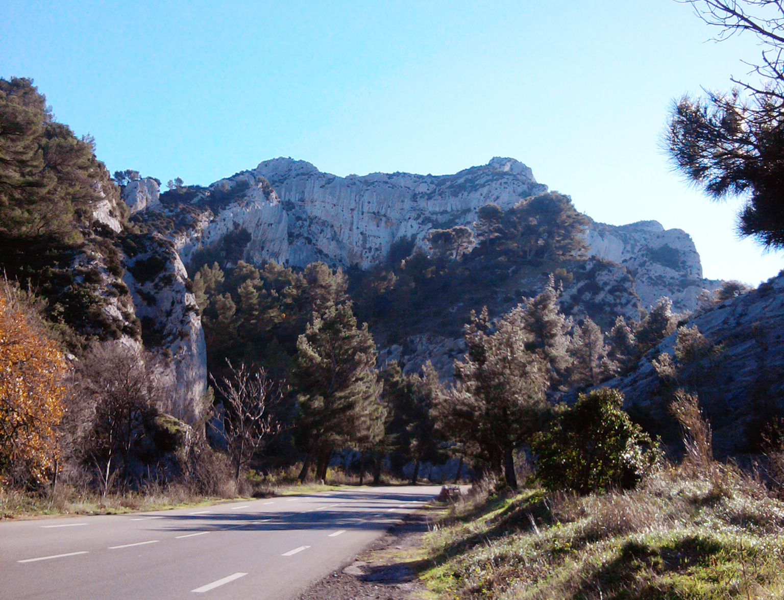 Mont Gaussier, commune de Saint-Rémy-de-Provence.